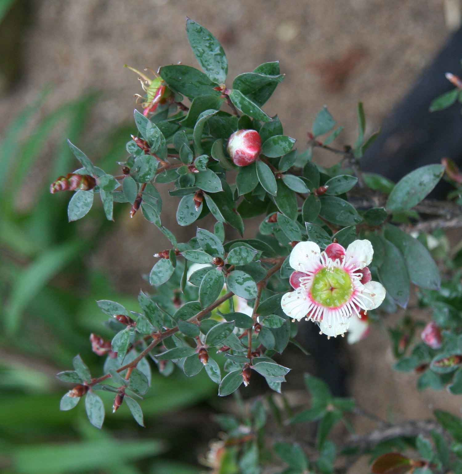 Leptospermum macrocarpum im Botanischen Garten Köln